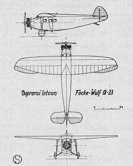 Focke-Wulf A 33, 3-D view (Letectví, July 1930)